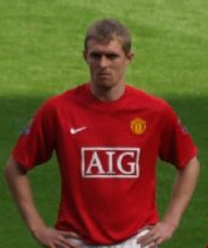 Darren Fletcher, Scotland & Man Utd midfielder